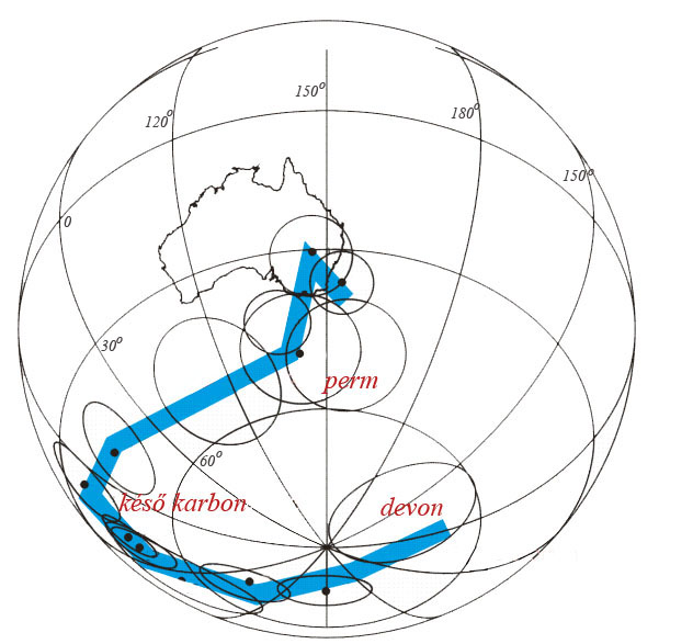 Pólus eltolódása